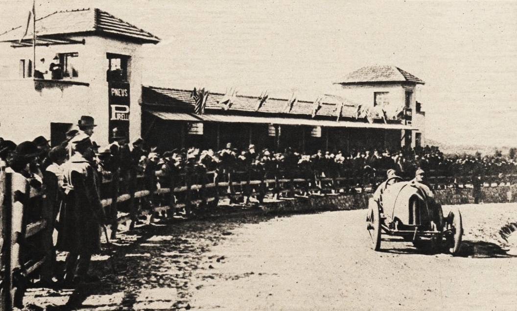 Guido Meregalli vainqueur de la Targa Florio 1920 sur voiture Nazzaro - Miroir des Sports du 4 novembre 1920, p.276